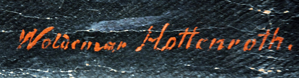 Signatur des Malers Woldemar Hottenroth